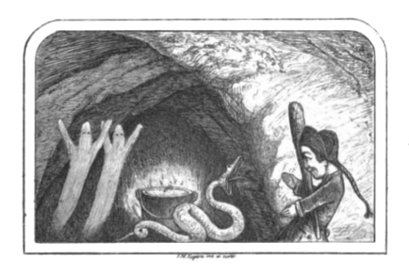 Les Souterrains du vieux château.